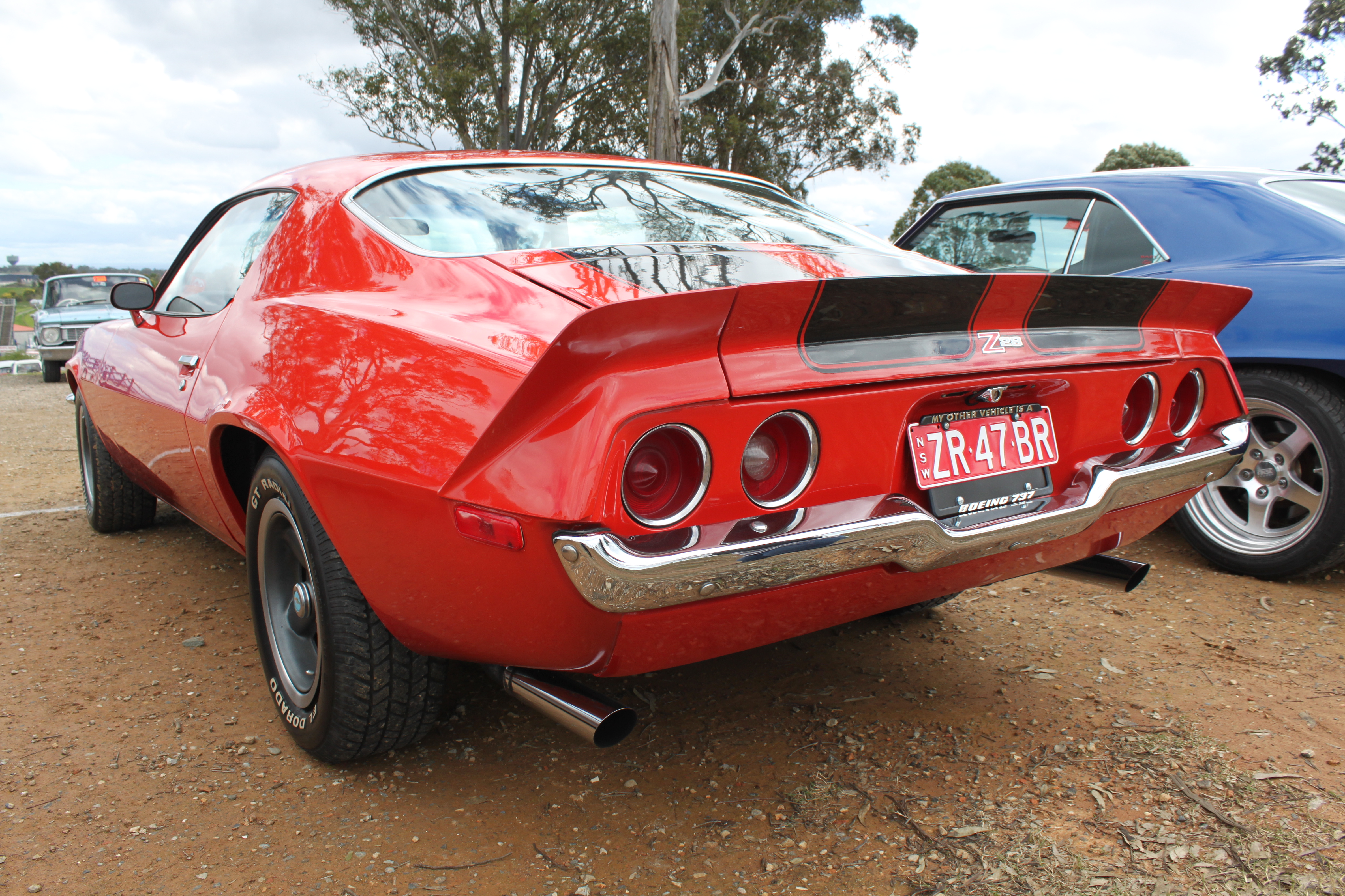 Chevrolet Camaro Z/28